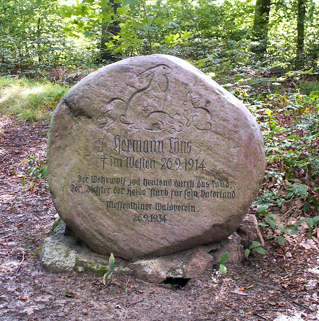 Głaz poświęcony Hermannowi Lönsowi na Wzgórzu Pokoju w Leśnie Górnym.